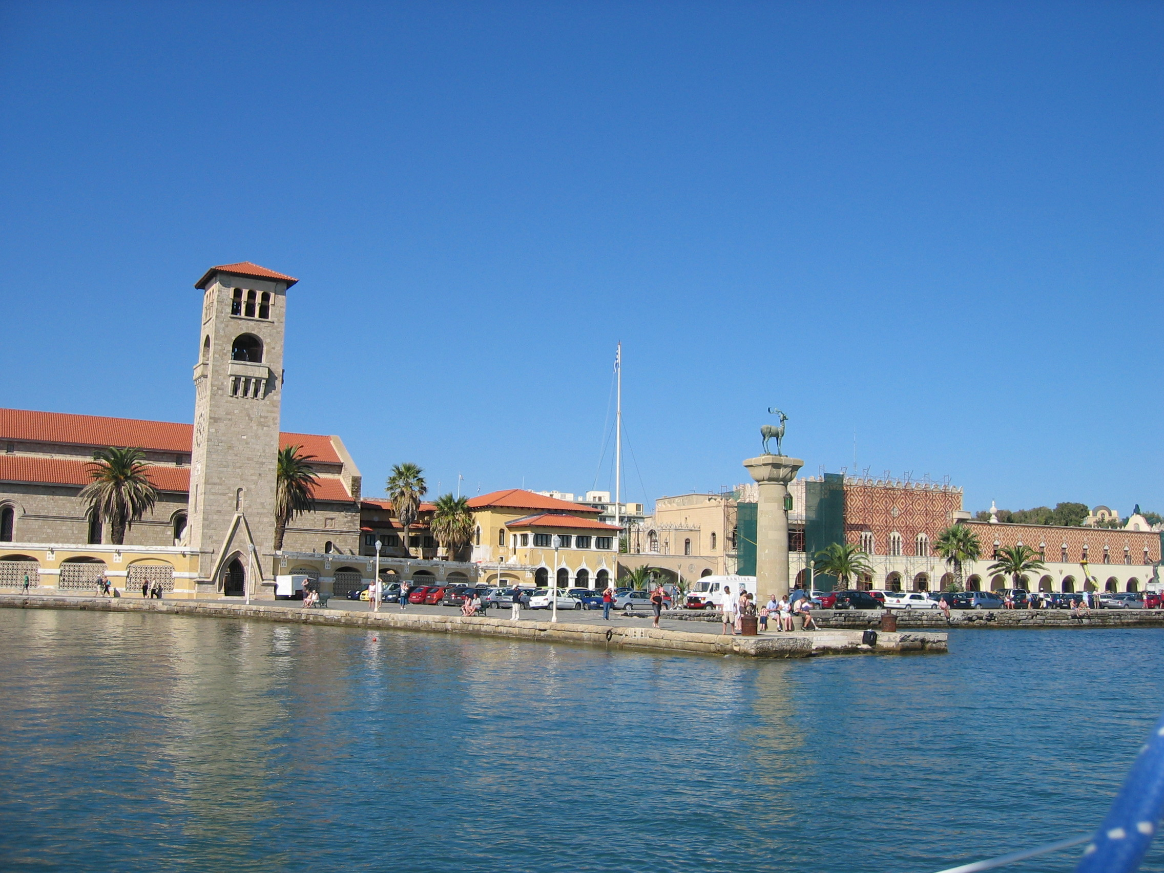 Einfahrt zum alten Hafen von Rhodos